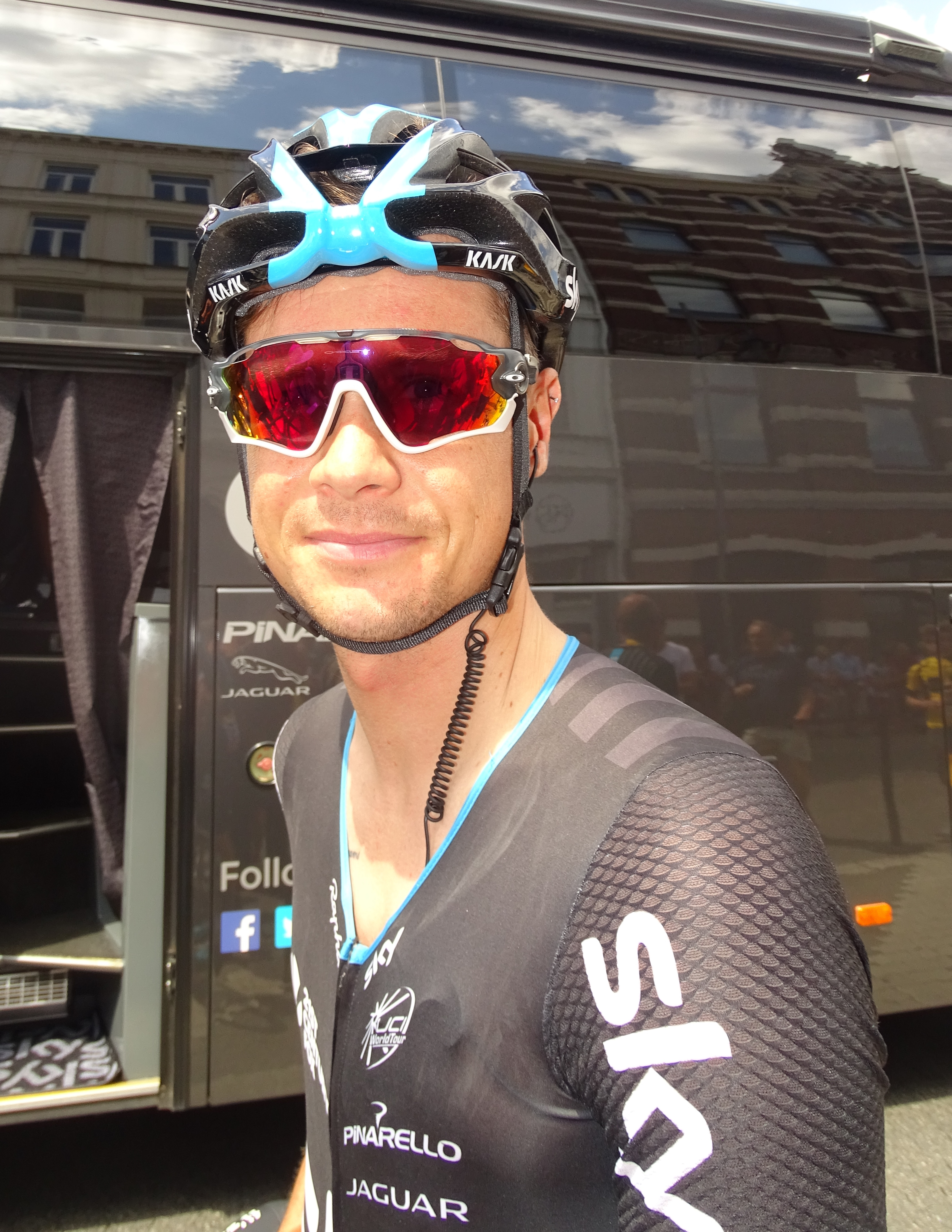 Reportage réalisé le lundi 6 juillet à l'occasion du départ de la troisième étape du Tour de France 2015 à Anvers, Belgique.